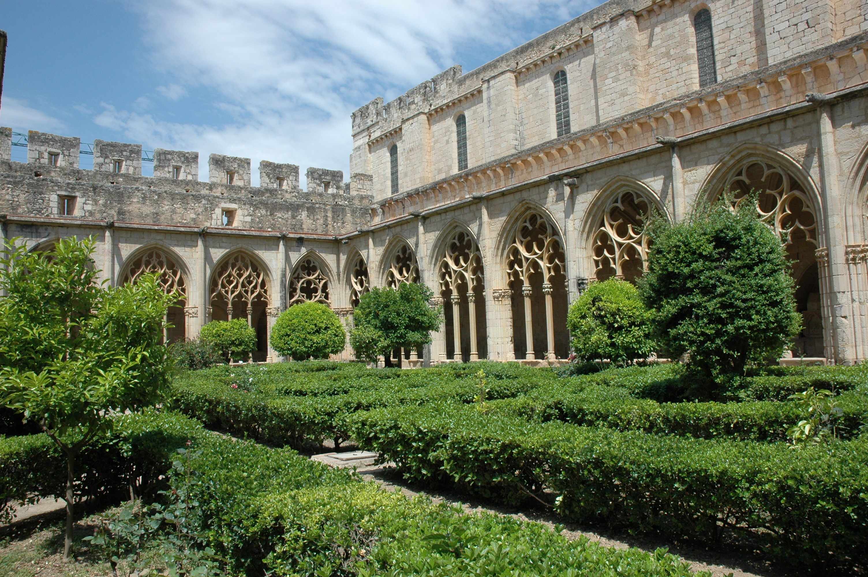 Monestir de Santes Creus - Claustre